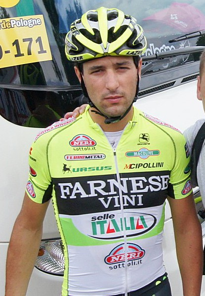 Oscar Gatto during Tour de Pologne 2012.